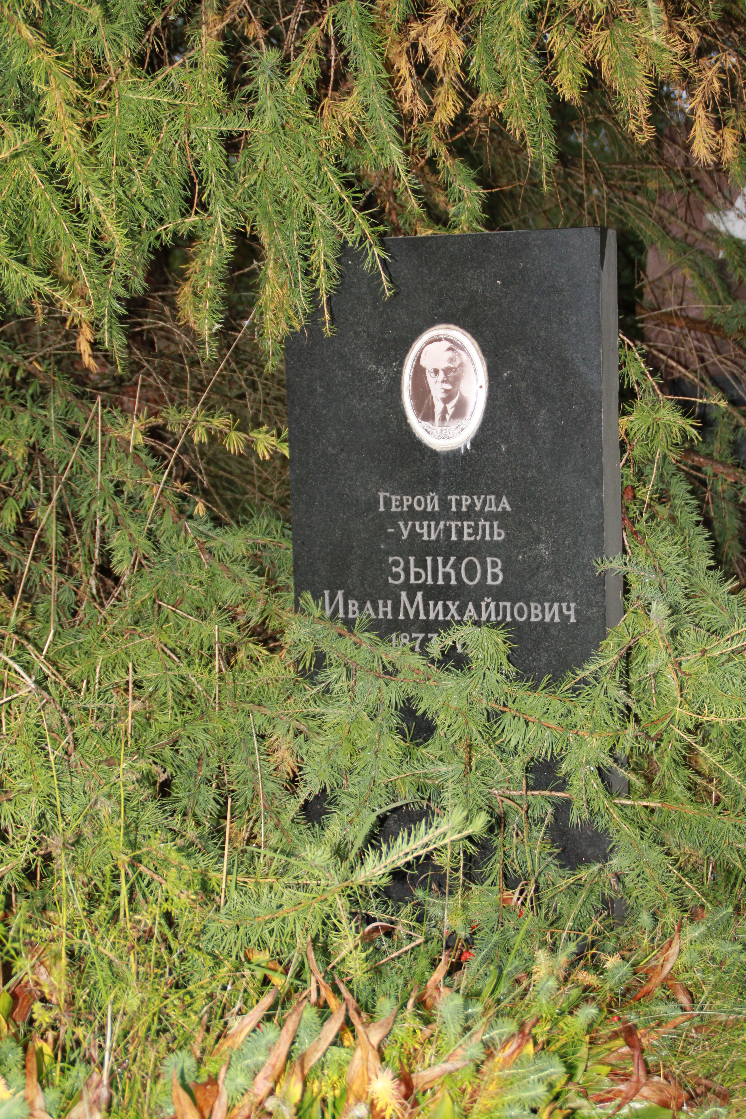 Могила Зыкова И.М. (1873-1939), учителя, Героя Труда: Сулажгорская улица, Сулажгорское кладбище, Петрозаводск, Карелия